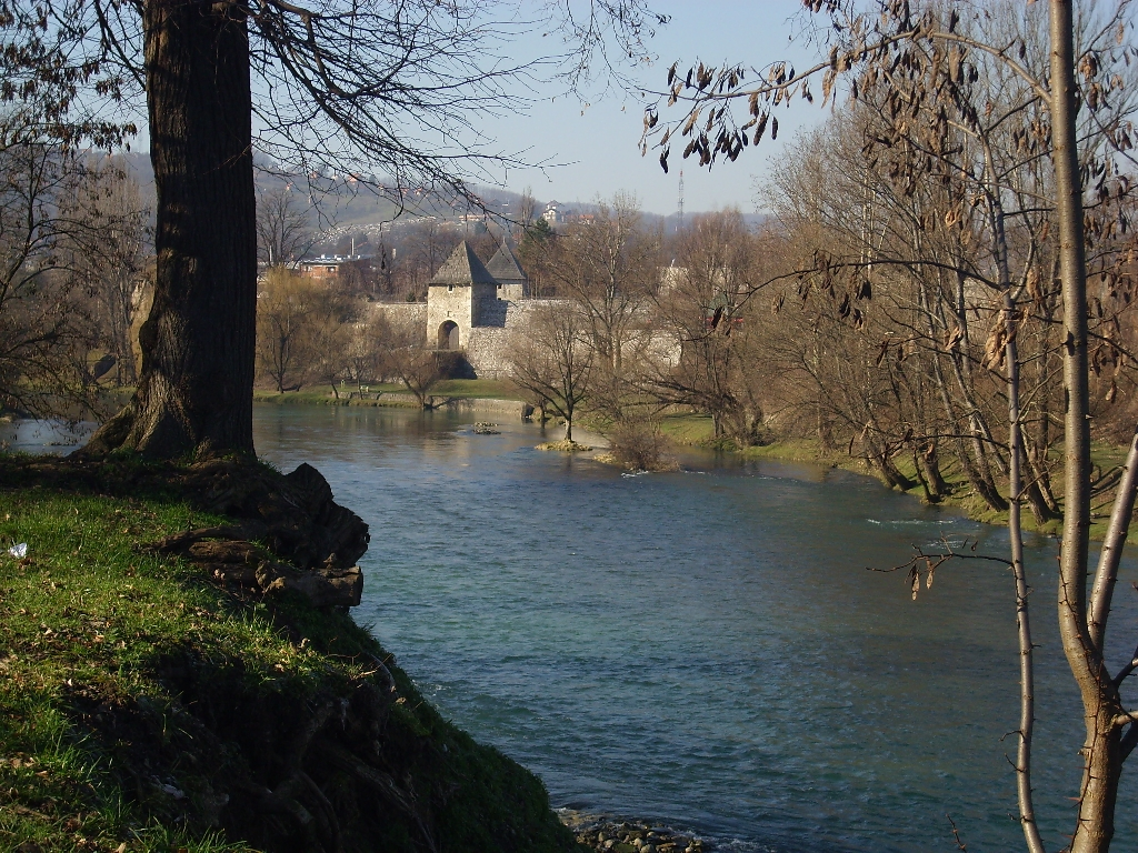 Rijeka Vrbas kod Banje Luke